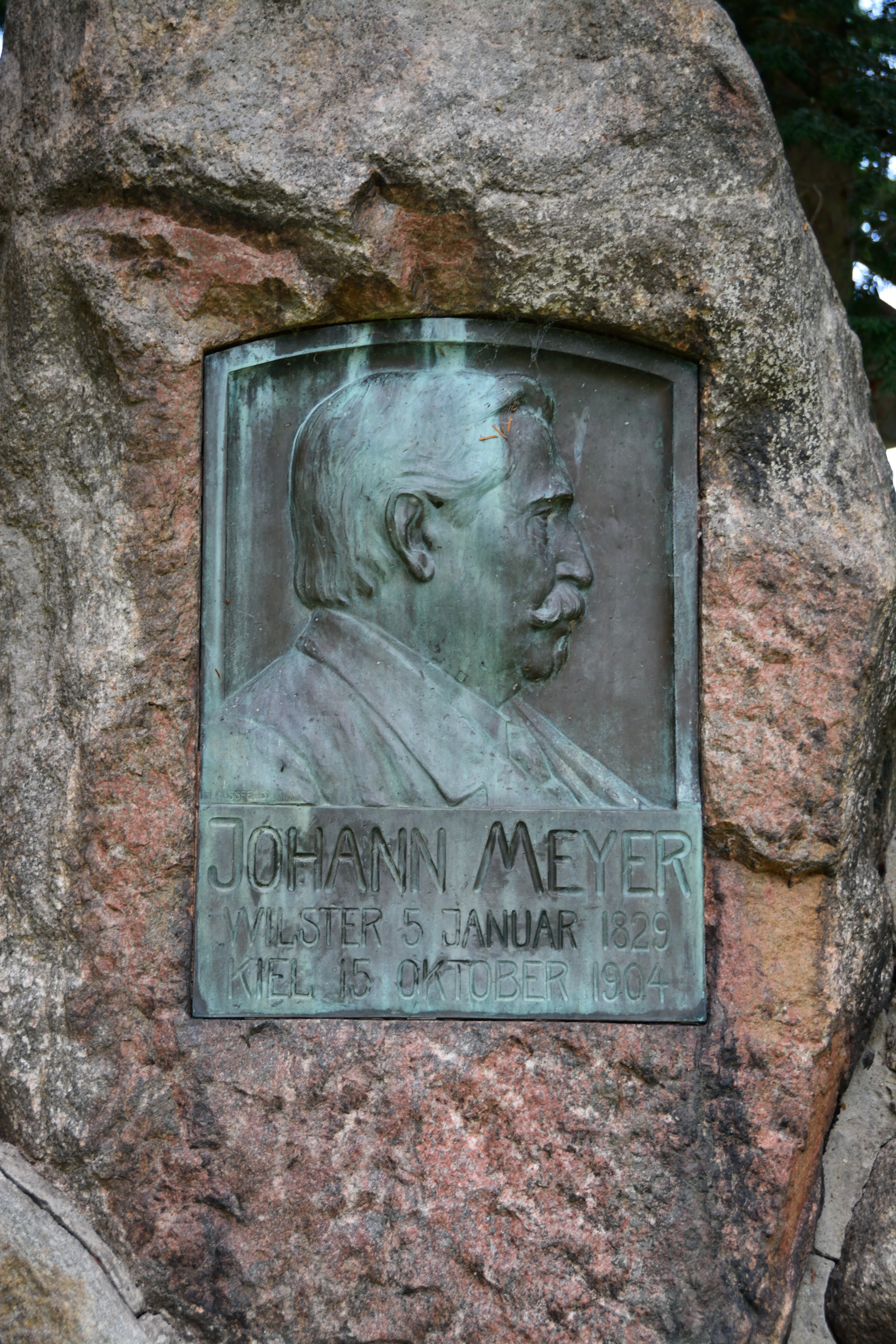 Impressionen aus dem Stadtpark Wilster Denkmal für Johann Meyer